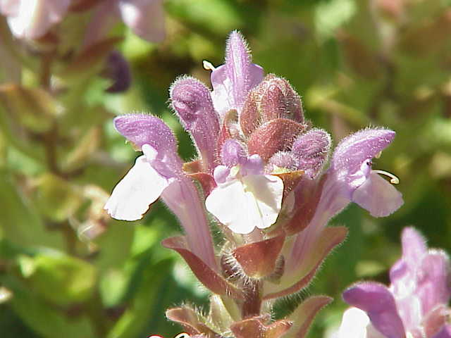 Species: Scutellaria alpina Family: Labiatae Image No. 1